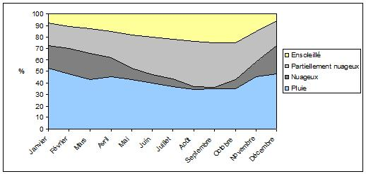 Etat du ciel à Hartford (Michigan, Etats-Unis).